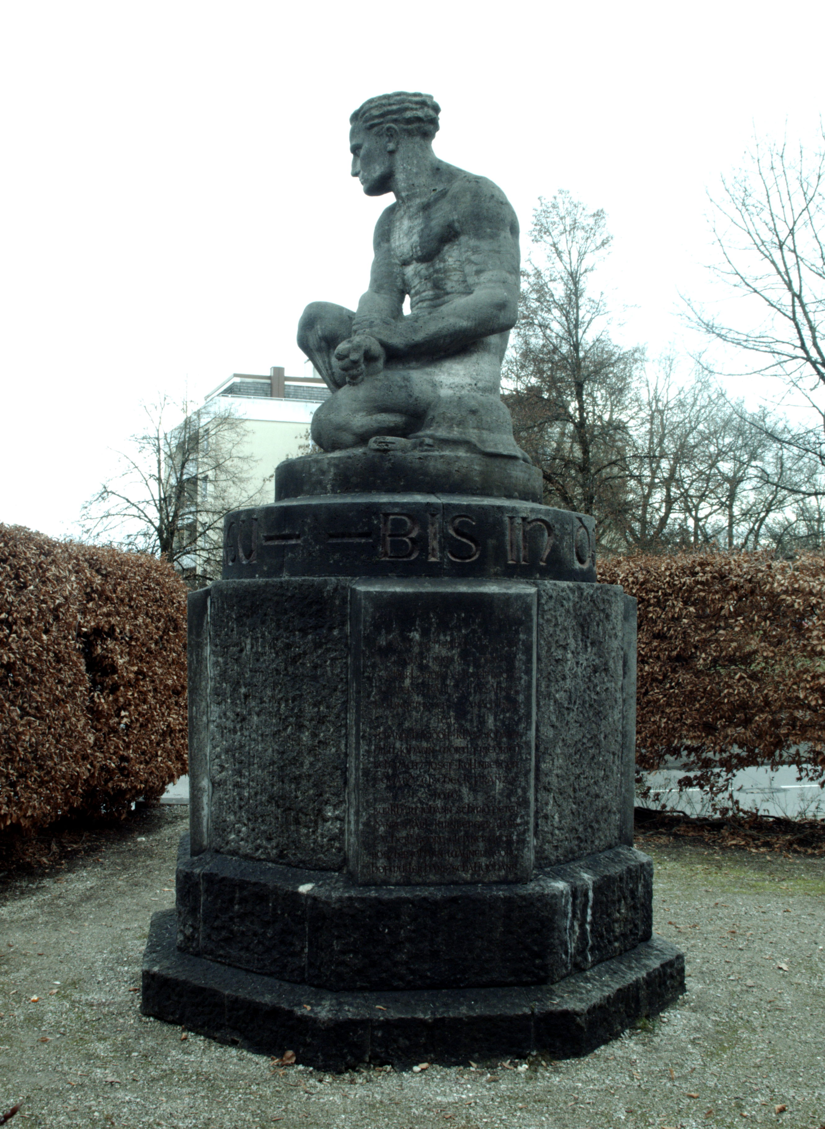 Kriegerdenkmal unter Denkmalschutz (D-1-88-120-4) in Gauting (Bahnhofstrße 23). Ansicht aus NordWest